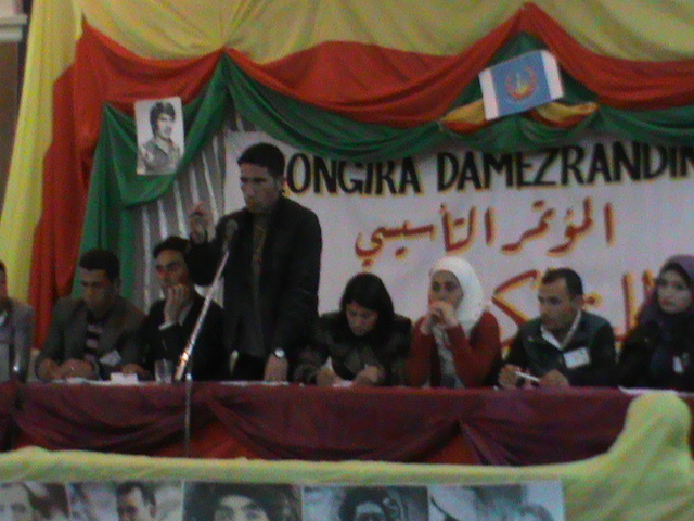 Kurdî: Kongreya damezrandina XWENDEKAR 27.03.2012 Heleb